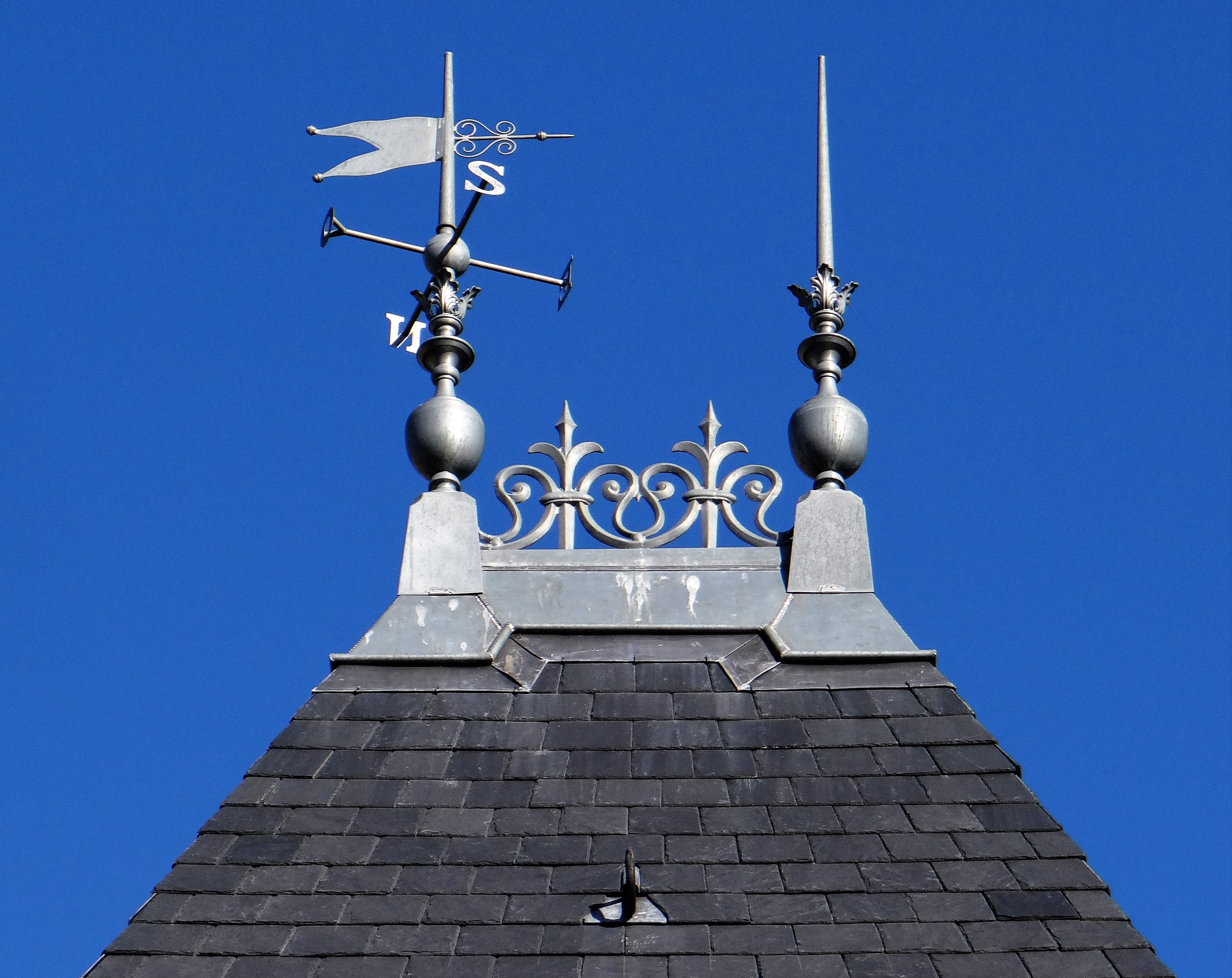 Villa Max, Chelles, Seine et Marne, France (réfection de la tour carrée, automne 2015). Les deux épis de faîtage, reliés par un feston en zinc, et ornés d’une girouette (reconstitution d'après l'original).